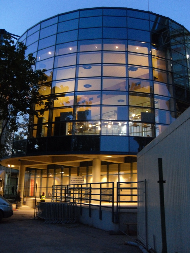 Centrum prasowe stadionu Wisły Kraków